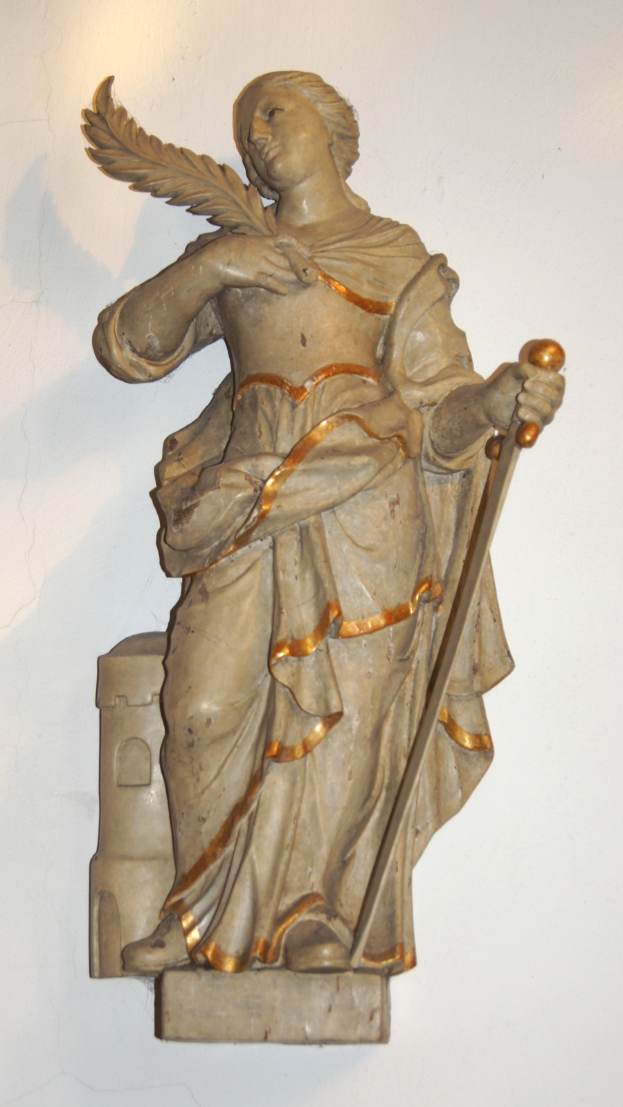 Hölzerne Statue der Hl. Barbara mit Palme, Schwert und Turm in der Klosterkirche St. Marien Burlo, Stadt Borken (NRW). Die Entstehung der Figur wird auf das Ende des 17. / Anfang des 18. Jahrhunderts datiert. This is a photograph of an architectural monument. A1 - A 26